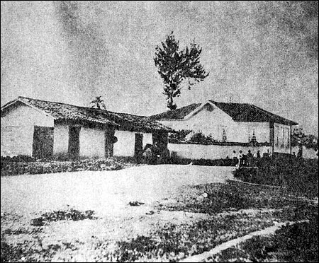 Foto tirada em 1862, por M. A. Azevedo, e conservada no Museu Paulista da Universidade de São Paulo.